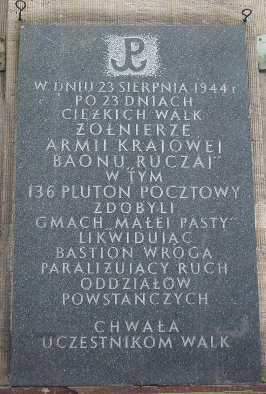 Tablica upamietniajaca zdobycie budynku malej PASTy przy ul. Pieknej w Warszawie w dniu 23 sierpnia 1944 r.